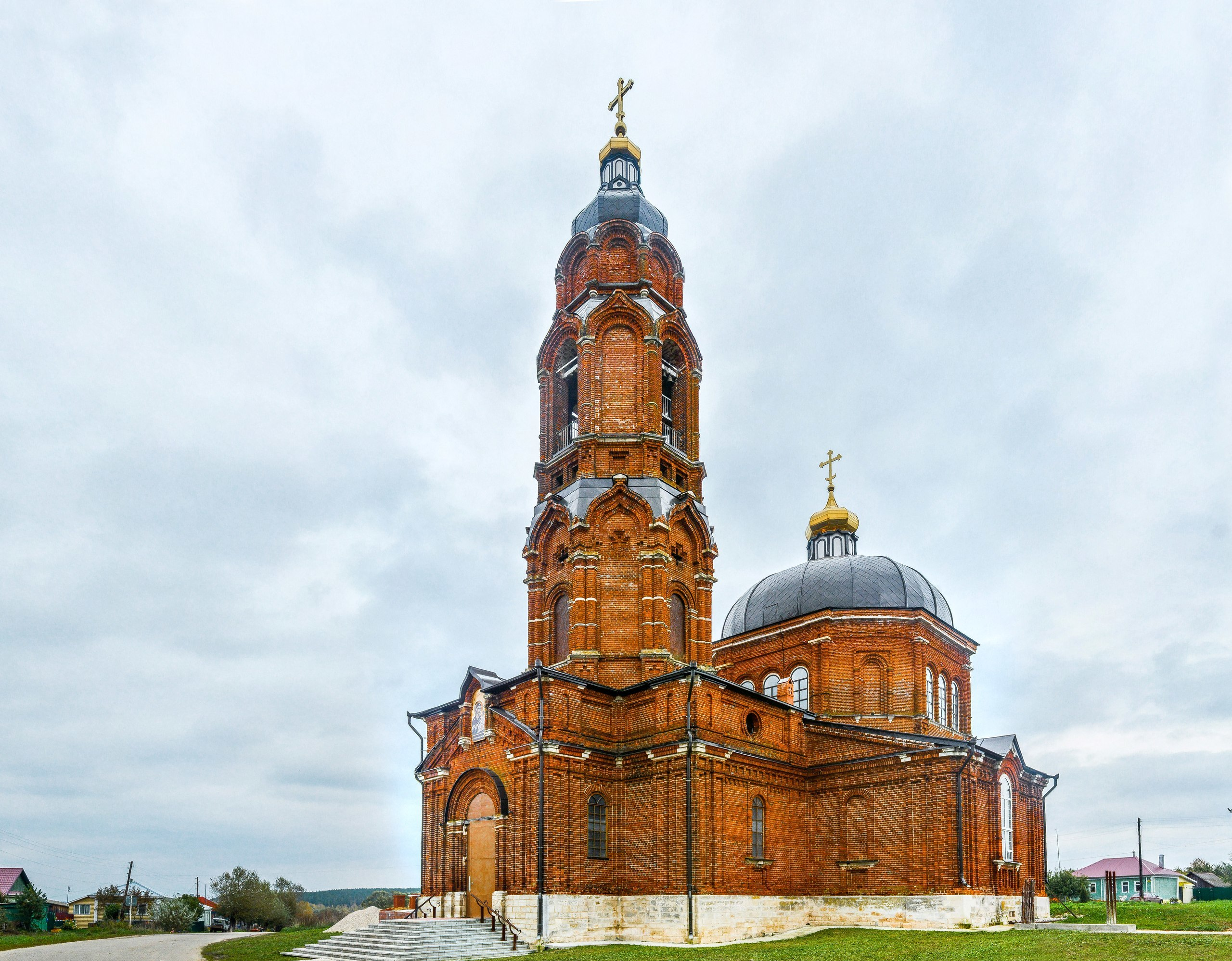 Церковь в с. Балушево-Починки, Касимовский район, Рязанская область